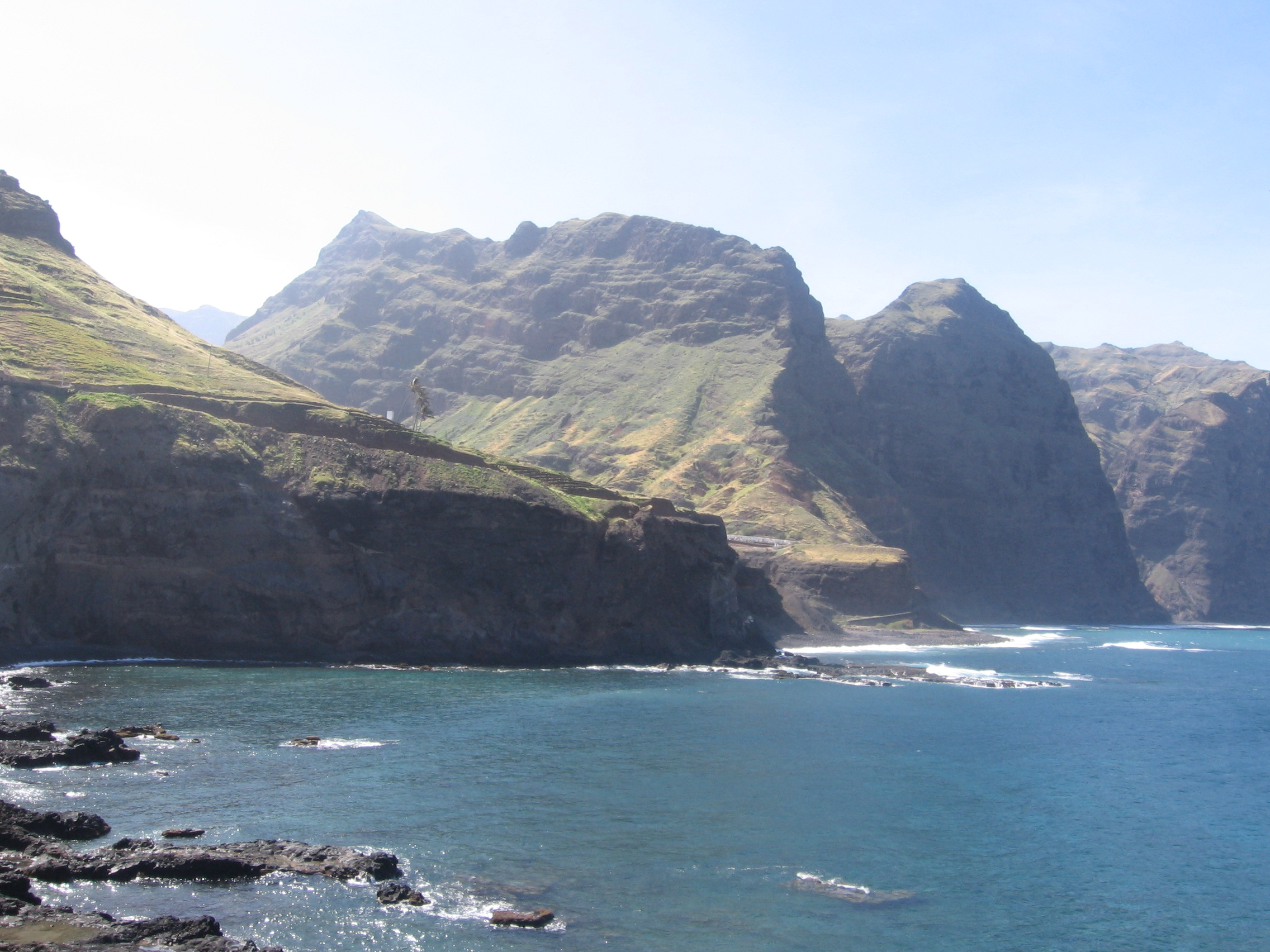 Foz da ribeira da Garça, Santo Antão, Cabo Verde